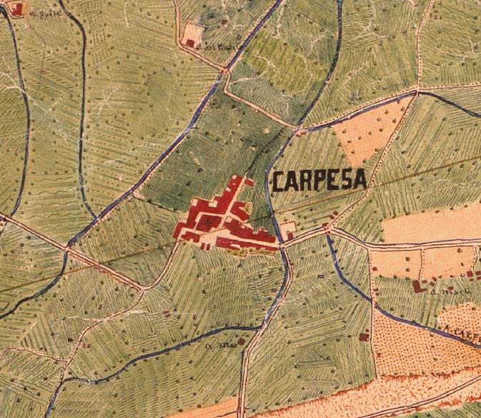 Carpesa el 1883 (el nord està a la dreta).